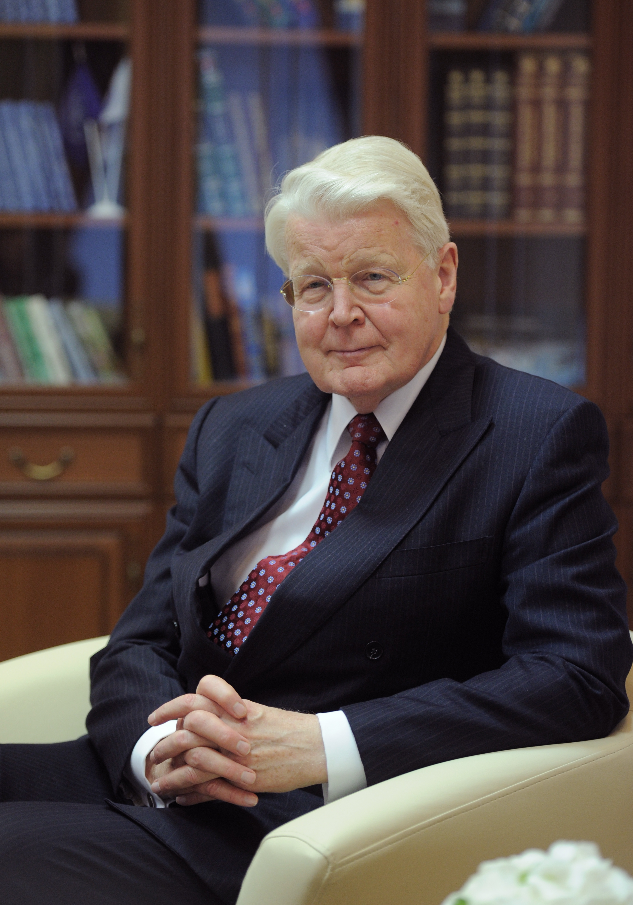 Президент Исландии Олаф Рагнар Гримссон на встрече с Председателем Правительства РФ Владимиром Путиным в рамках Международного арктического формуа в Архангельске